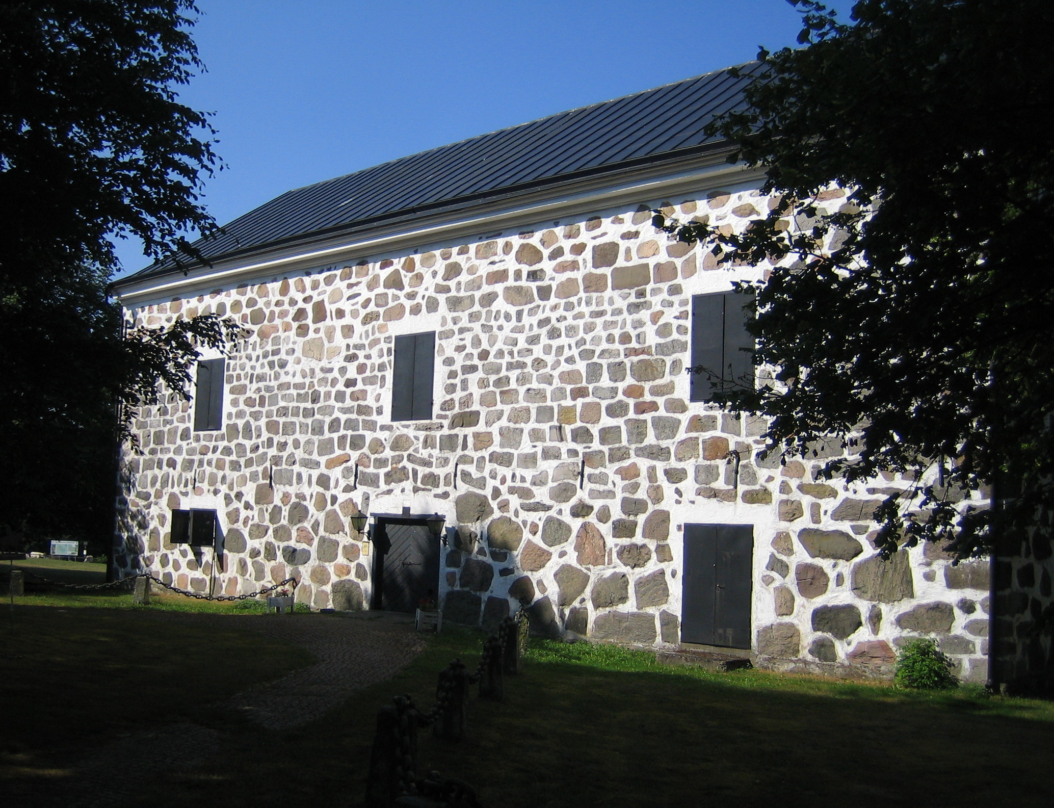 Barn at Herrevads kloster, Sweden